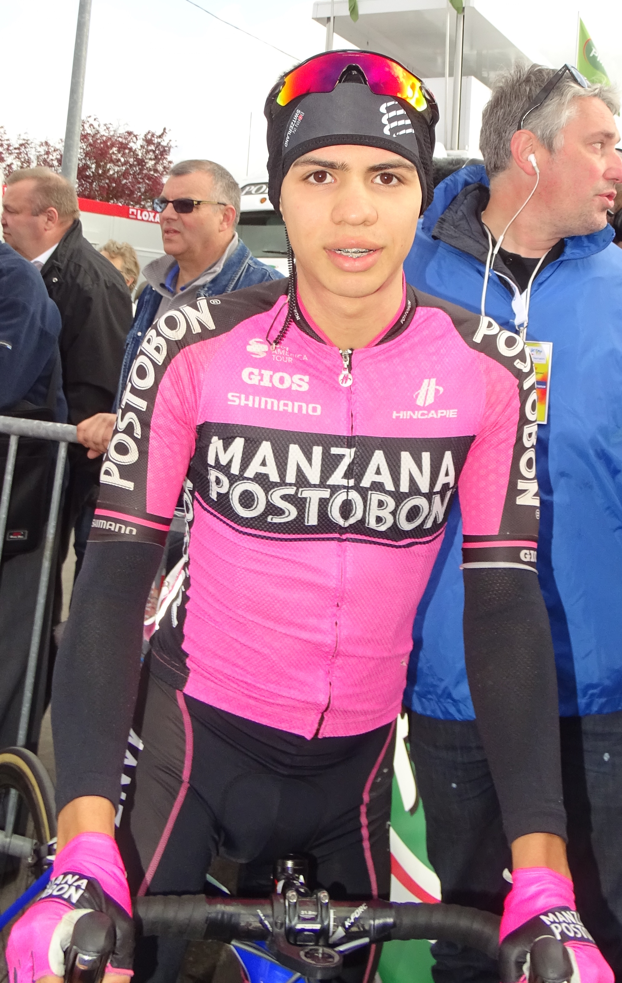 Reportage réalisé le jeudi 13 avril à l'occasion du départ et de l'arrivée du Grand Prix de Denain 2017 à Denain, Nord, Nord-Pas-de-Calais-Picardie, France.